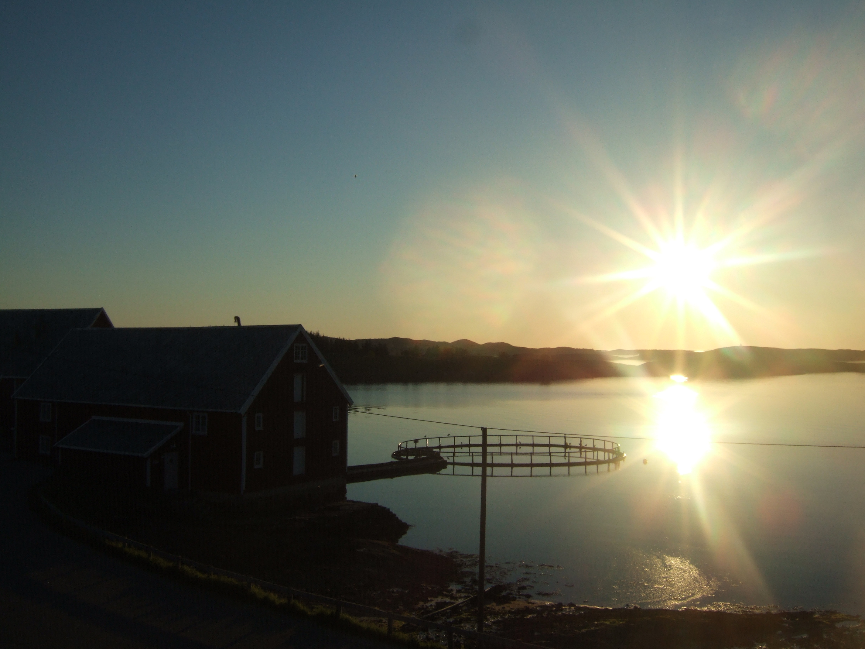 Kveldssol over Selsøyvik